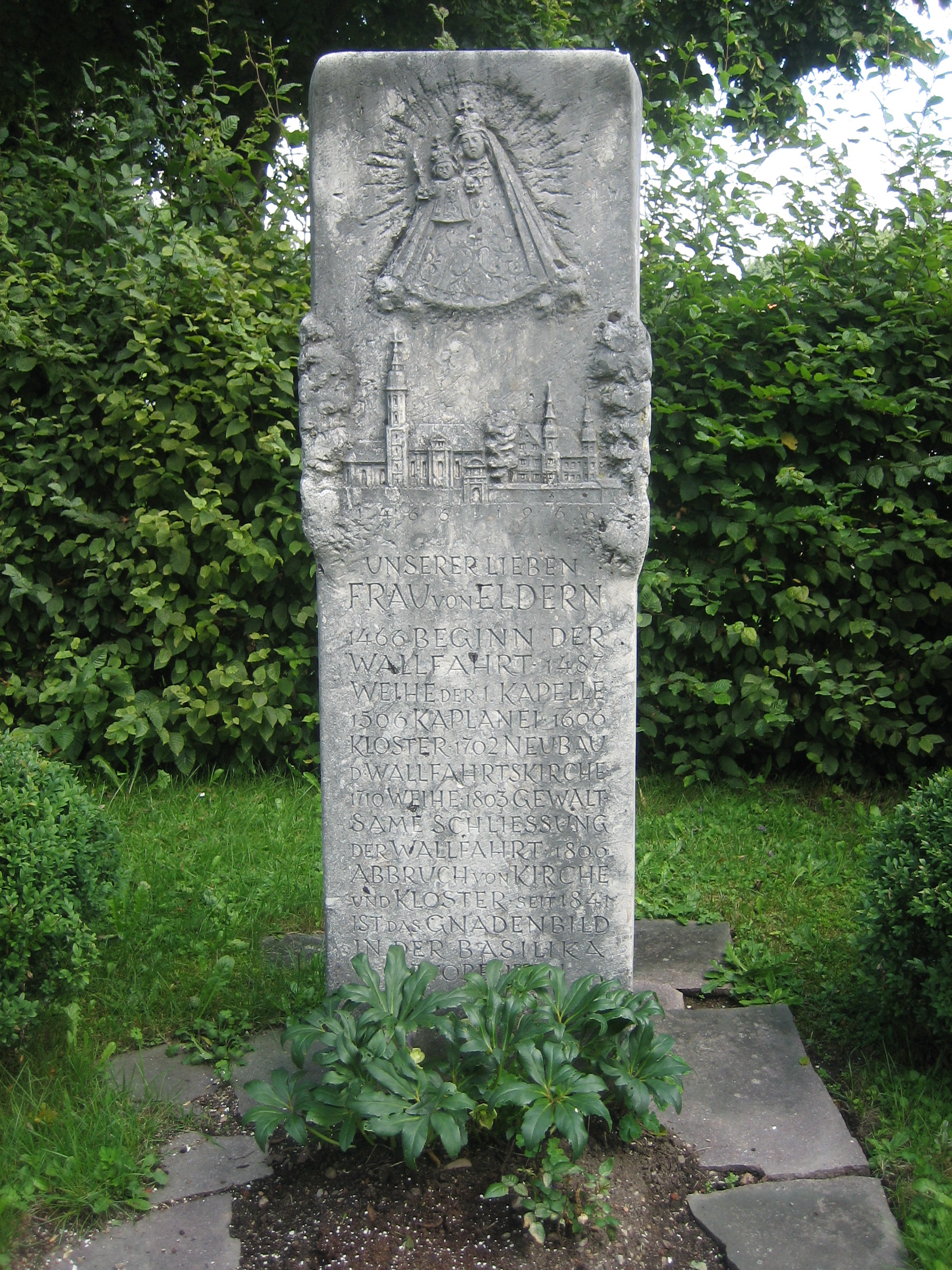 Wallfahrtskapelle Eldern, bei Ottobeuren, Landkreis Unterallgäu, Bayern